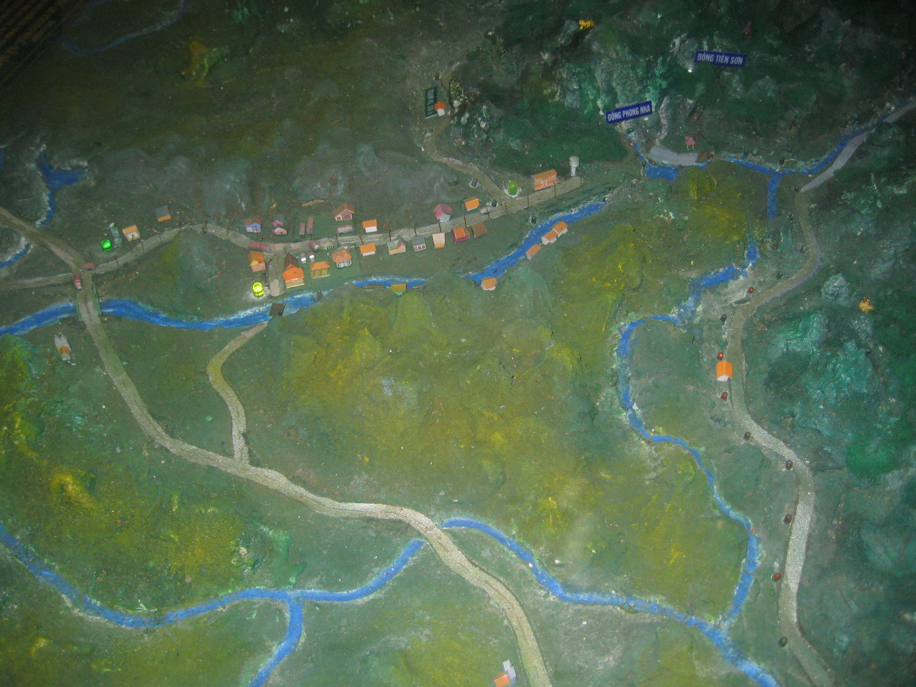 Phong Nha-Ke Bang National Park in Vietnam